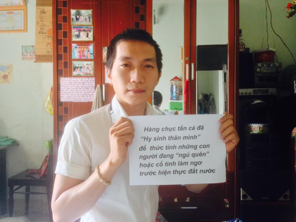 Sự kiện cá chết 4 tỉnh miền Trung Việt Nam.